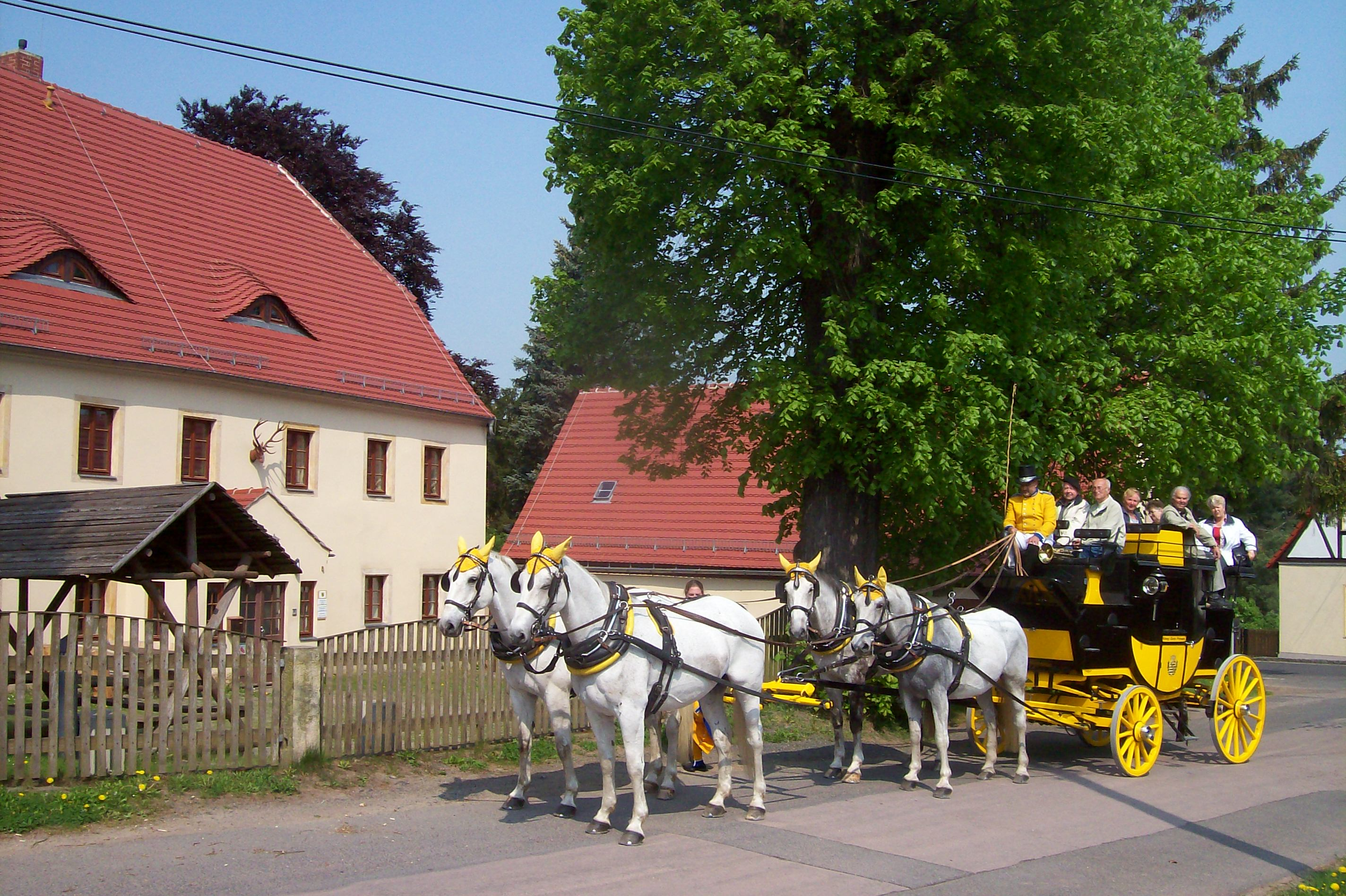 Postkutsche am Forstamt Spechtshausen